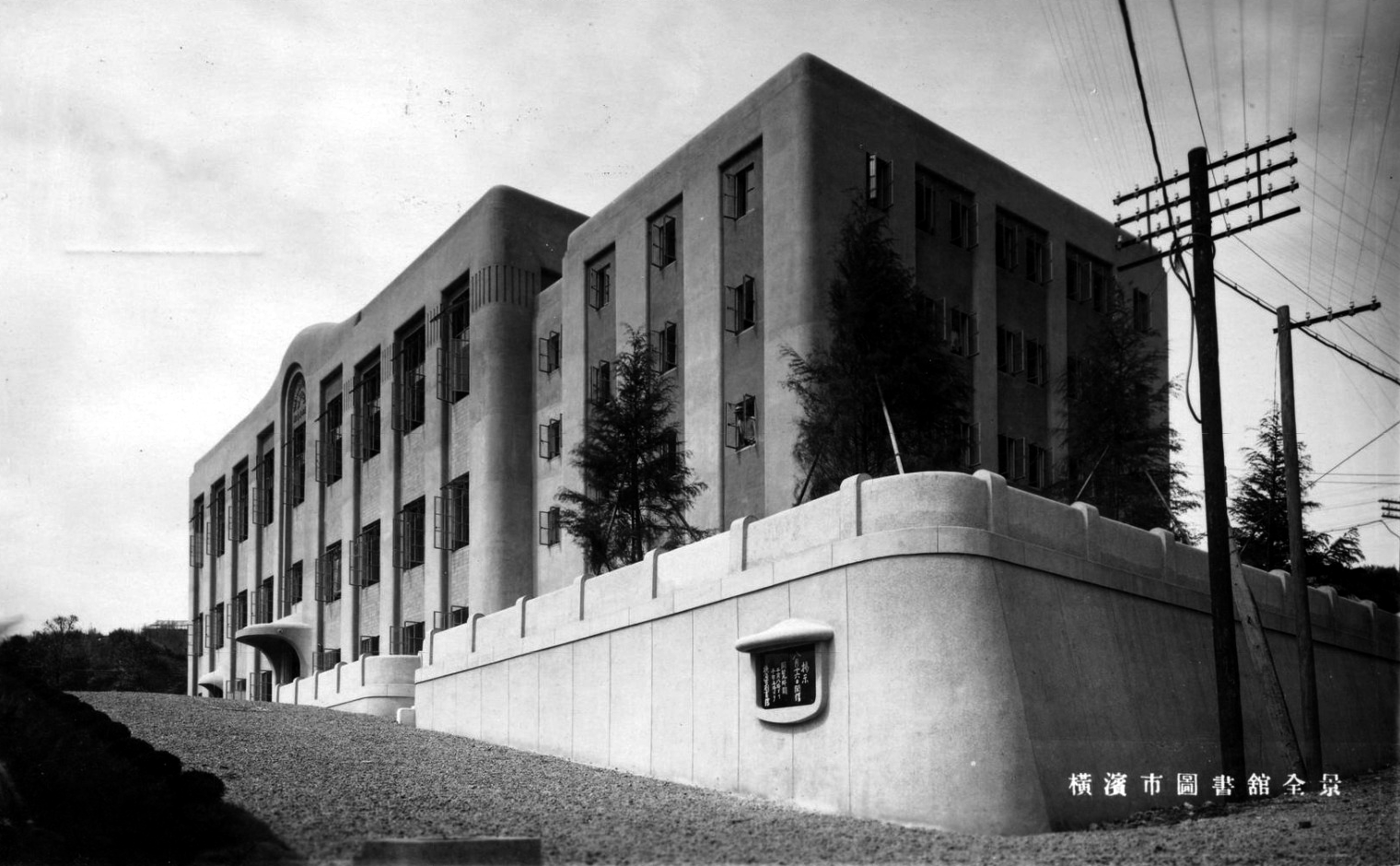 横浜市図書館全景。